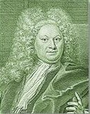 Иоганн Генрих Линк (старший)